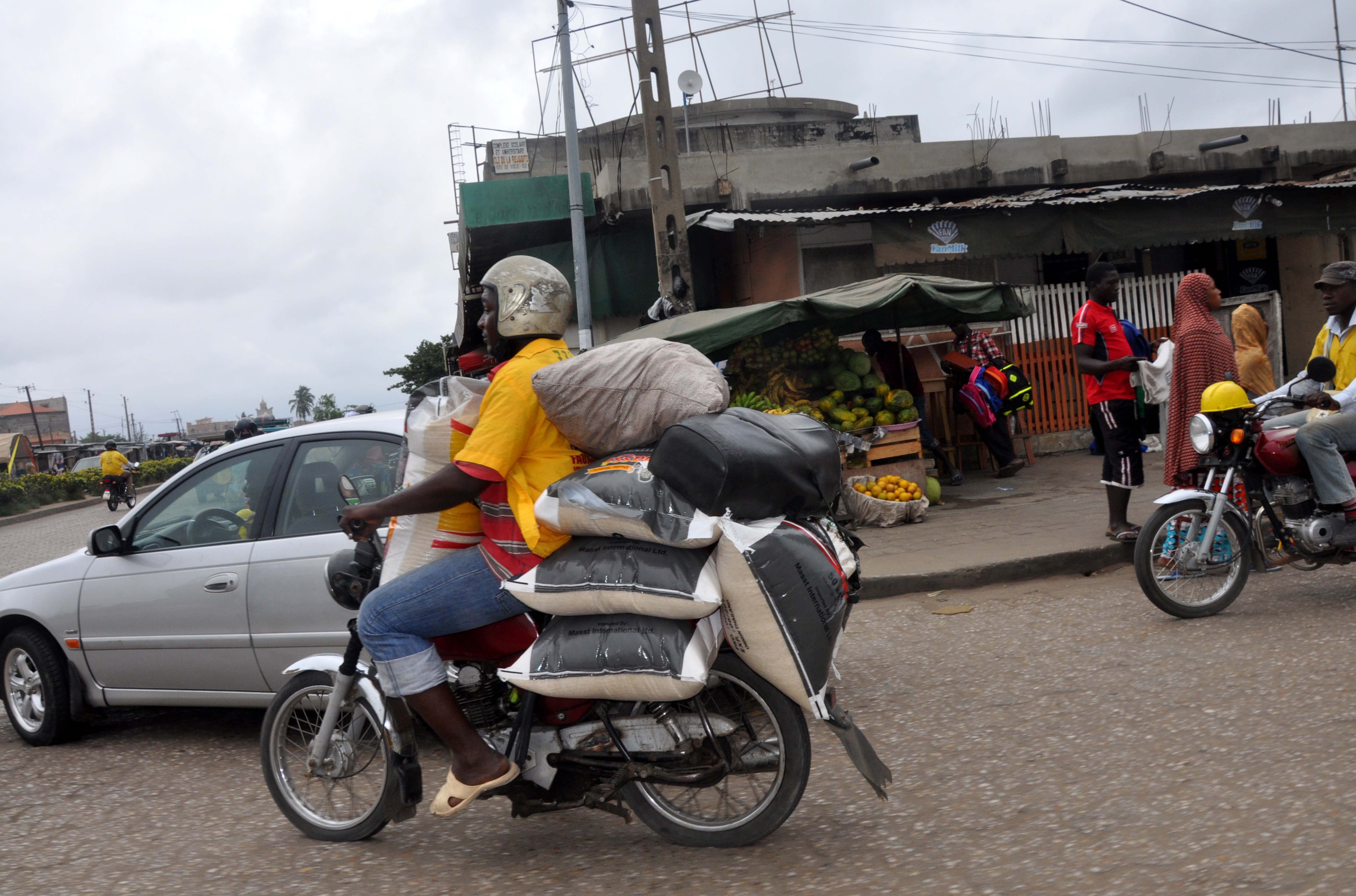 c he is obliged to overload his motorcycle with goods so as not to be a competitor This is an image with the theme "Africa on the Move or Transport" from: Benin